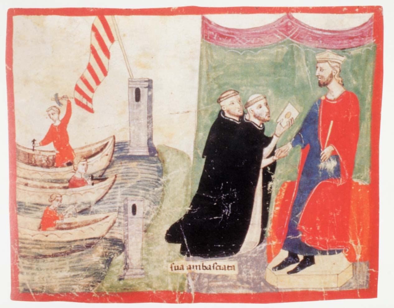 Nuova cronica. f.123v (1.VIII,60) ms. Chigiano L VIII 296. Preparatius de Pere III d'Aragó per anar cap a Sicília. El rei rep la visita de dos frares dominics enviats pel papa Martí IV.